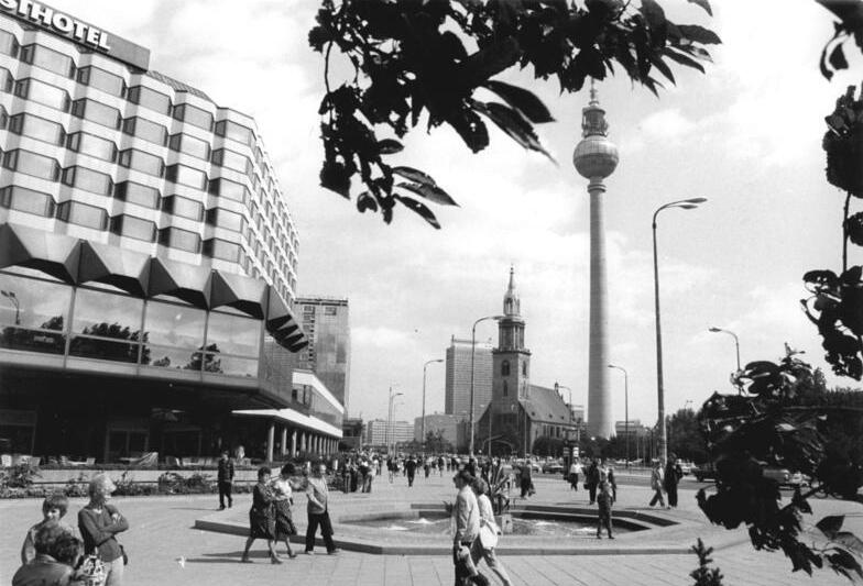 Berlin, Karl-Liebknecht-Straße, "Palasthotel", Fernsehturm ADN-ZB Pätzold-19.8.81 Berlin: Trotz wechselhafter Witterung ist das Zentrum der DDR-Hauptstadt, hier die Karl-Liebknecht-Straße, von den Berlinern und ihren Gästen belebt.